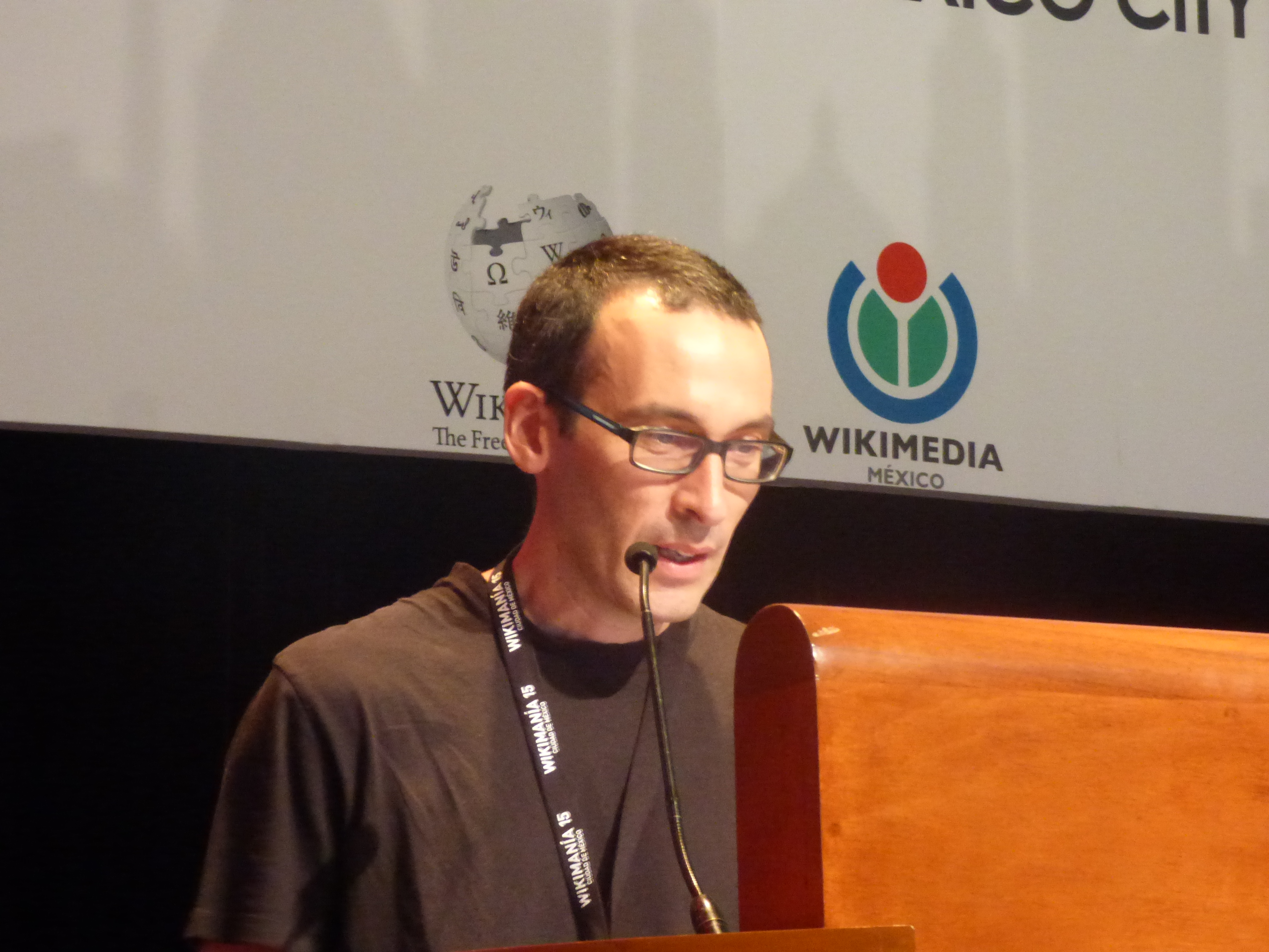 César Rendueles durante su conferencia en Wikimanía 2015